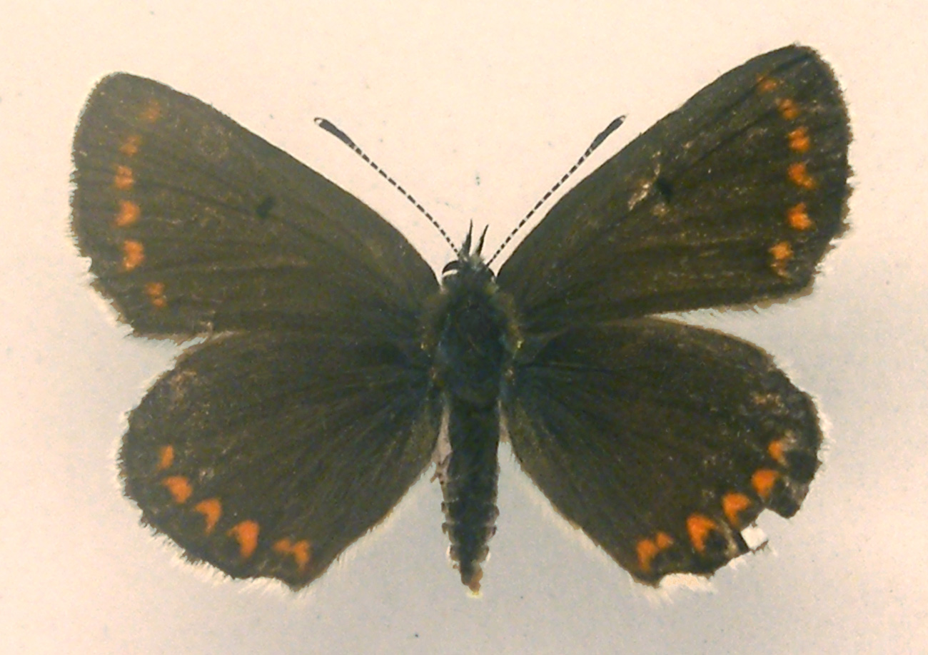 Plebeius artaxerxes same as Aricia artaxerxes (Fabricius, 1793)